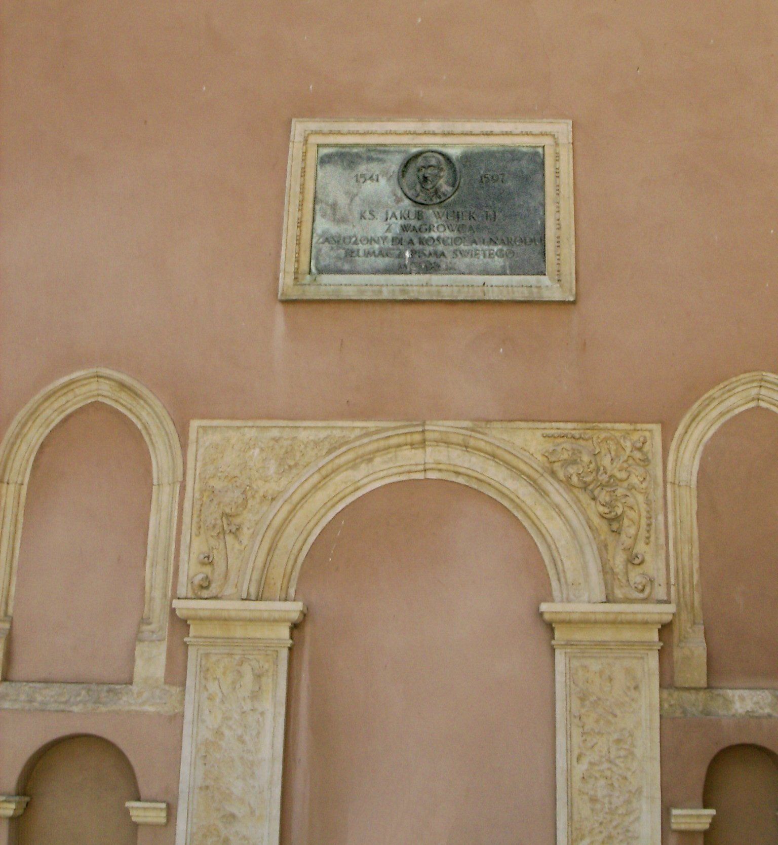 Jakub Wujek. Tablica pamiątkowa w krakowie.